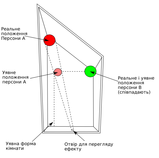 Ames Room. Two person